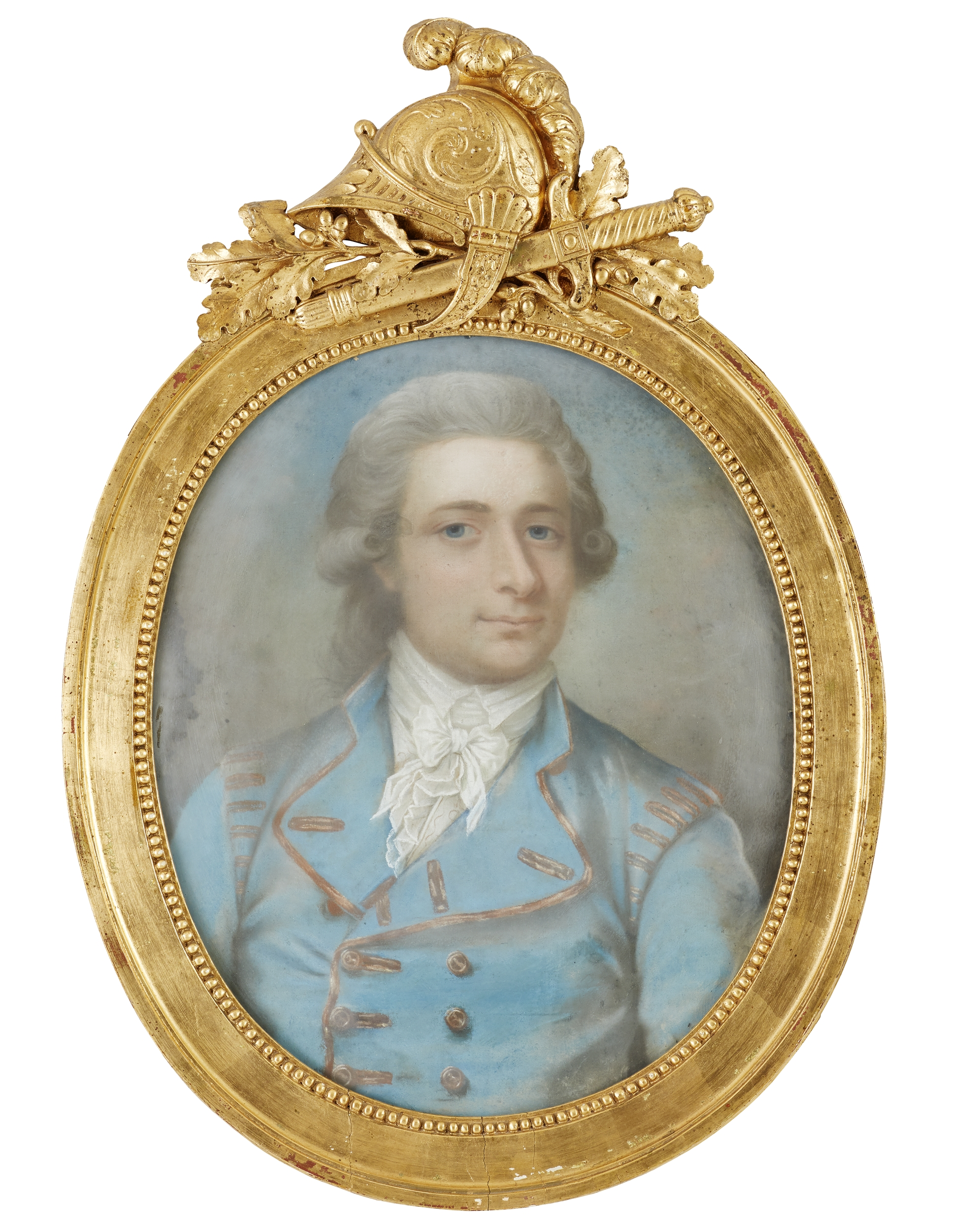 Porträtt Erik von Boisman (1740-1821) iklädd variant av svenska dräkten. Avporträtterad ca 1790 av Jonas Forsslund.